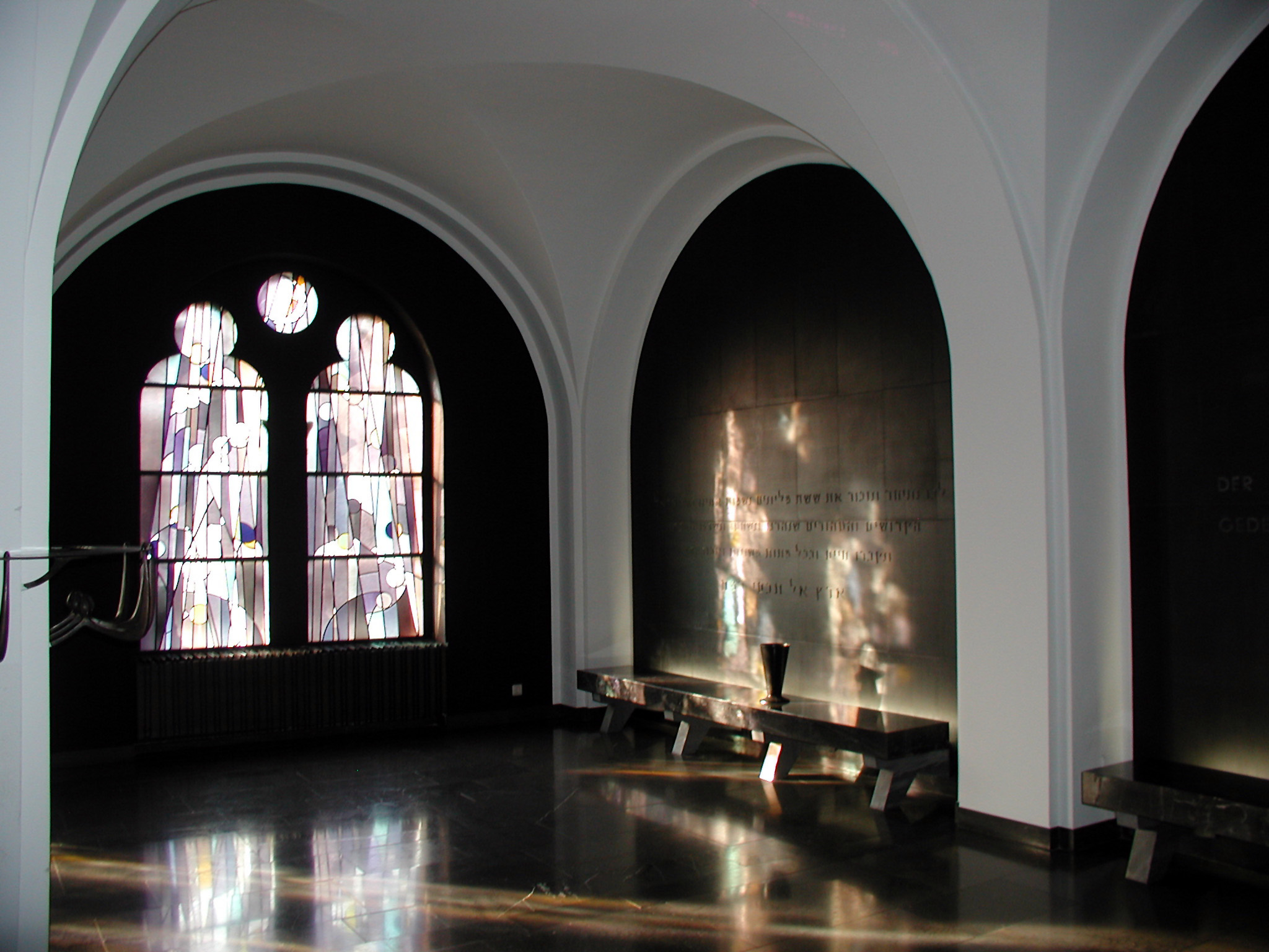 Synagoge Roonstraße Köln, Gedenkhalle im Obergeschoss